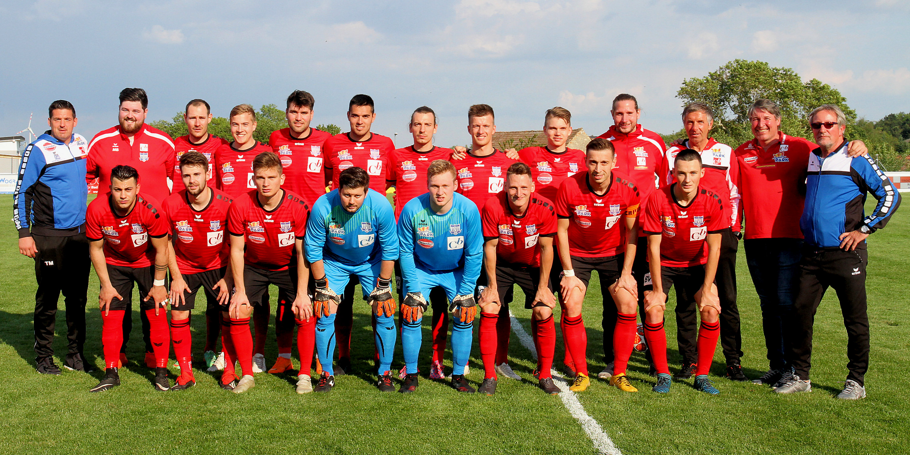 Meisterschaftsspiel der Landesliga Burgenland 2018/19 ASV Draßburg (rote Trikots) vs. SC Ritzing (schwarze Trikots) 2:3 (0:3) am 1. Juni 2019 in Draßburg. – Das Bild zeigt die Mannschaft des ASV Draßburg.